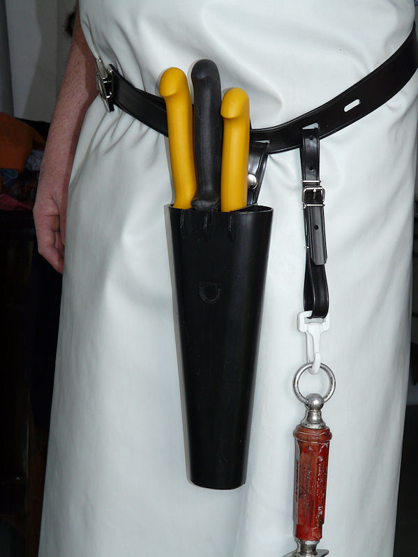 Messerköcher auch Messertasche trägt der Metzger / Schlachter üblicherweise beim Schlachten stets bei sich. Darin sind seine Messer sicher und immer griffbereit untergebracht. Sie werden nach Gebrauch sofort wieder in den Messerköcher geführt. Die beim Schlachten benötigten scharfen Messer stellen somit keine Unfallgefahr dar. Auch ist die Verletzungsgefahr durch herumliegende Messer hierbei ausgeschlossen. Am Riemen kann zusätzlich der Stahl zum Schärfen der Messer eingehängt werden. Messerköcher / Messertaschen werden in verschiedenen Größen und Farben angeboten. Sie gibt es in den Farben schwarz, weiß, gelb. Standardmäßig gibt es sie zur Unterbringung von 1 Messer bis 4 Messern. Den Gurt ziert eine Metallschnalle mit einem Fleischerwappen.